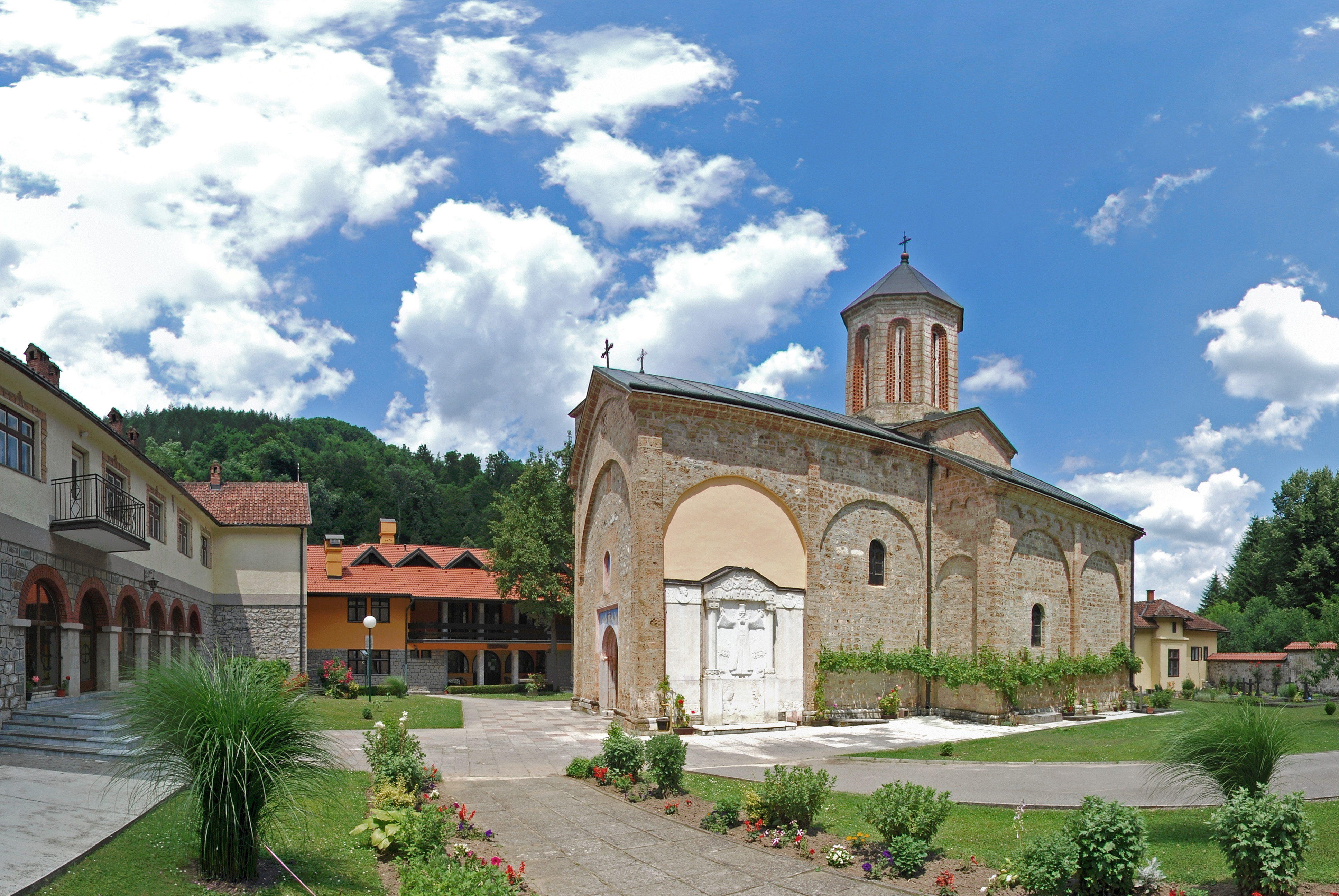 Манастир Рача надомак Бајине Башине, а з близини реке Дрине